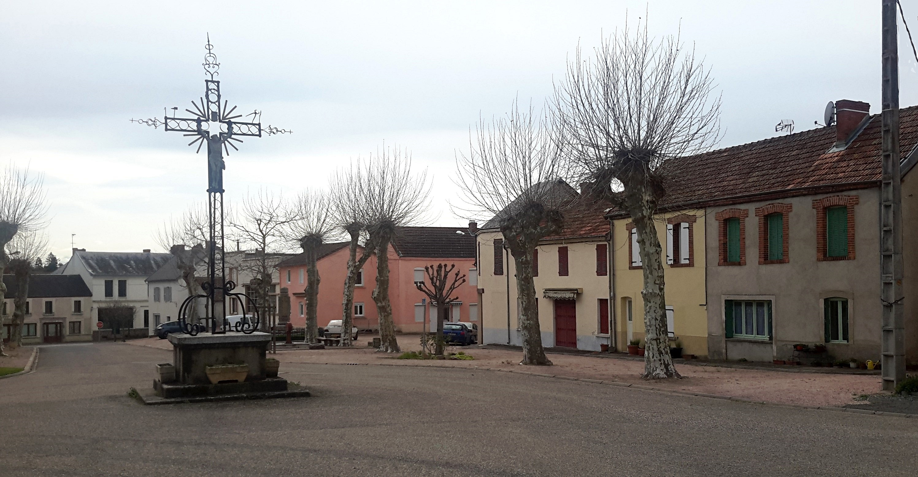 Centre du bourg, Isserpent, Allier, France.